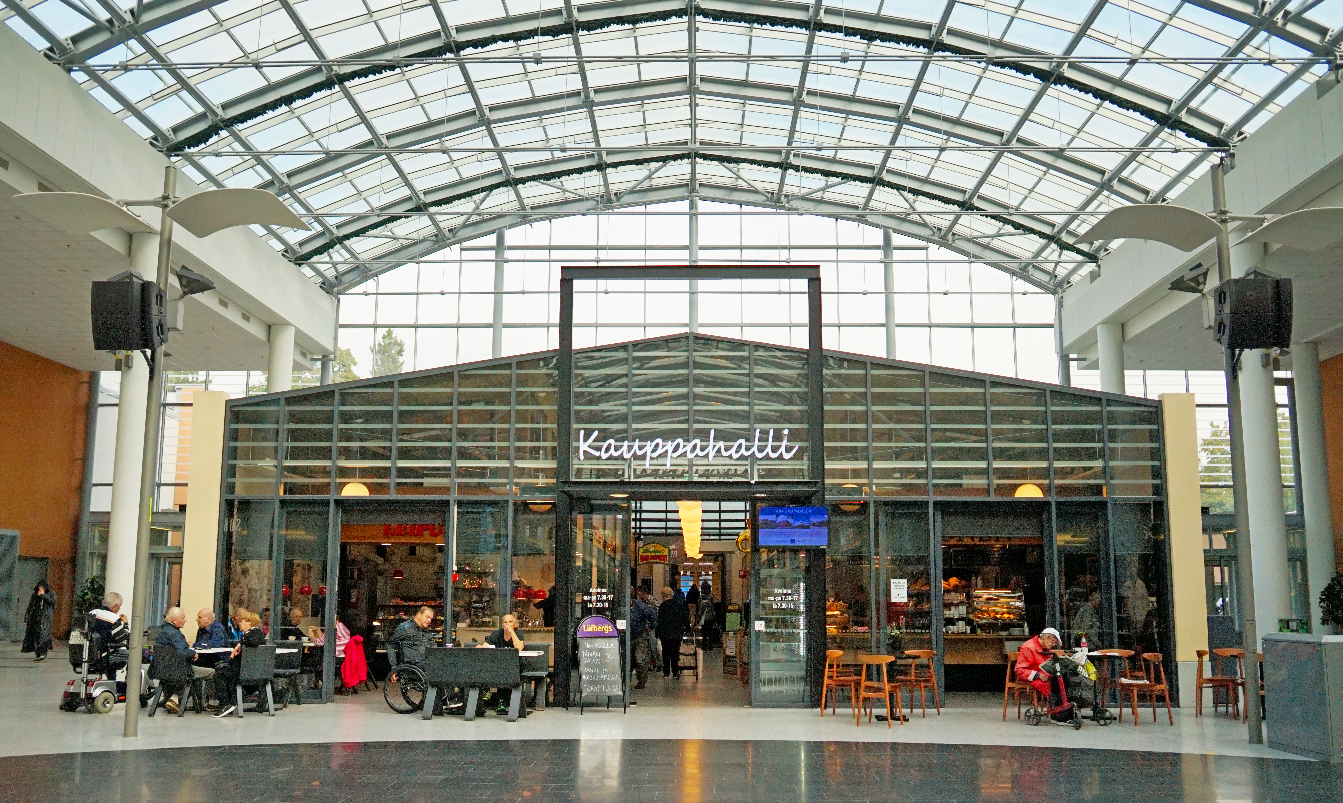 Kauppahalli Mikkelissä.